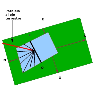 Reloj Ecuatorial 2 RPLl2006